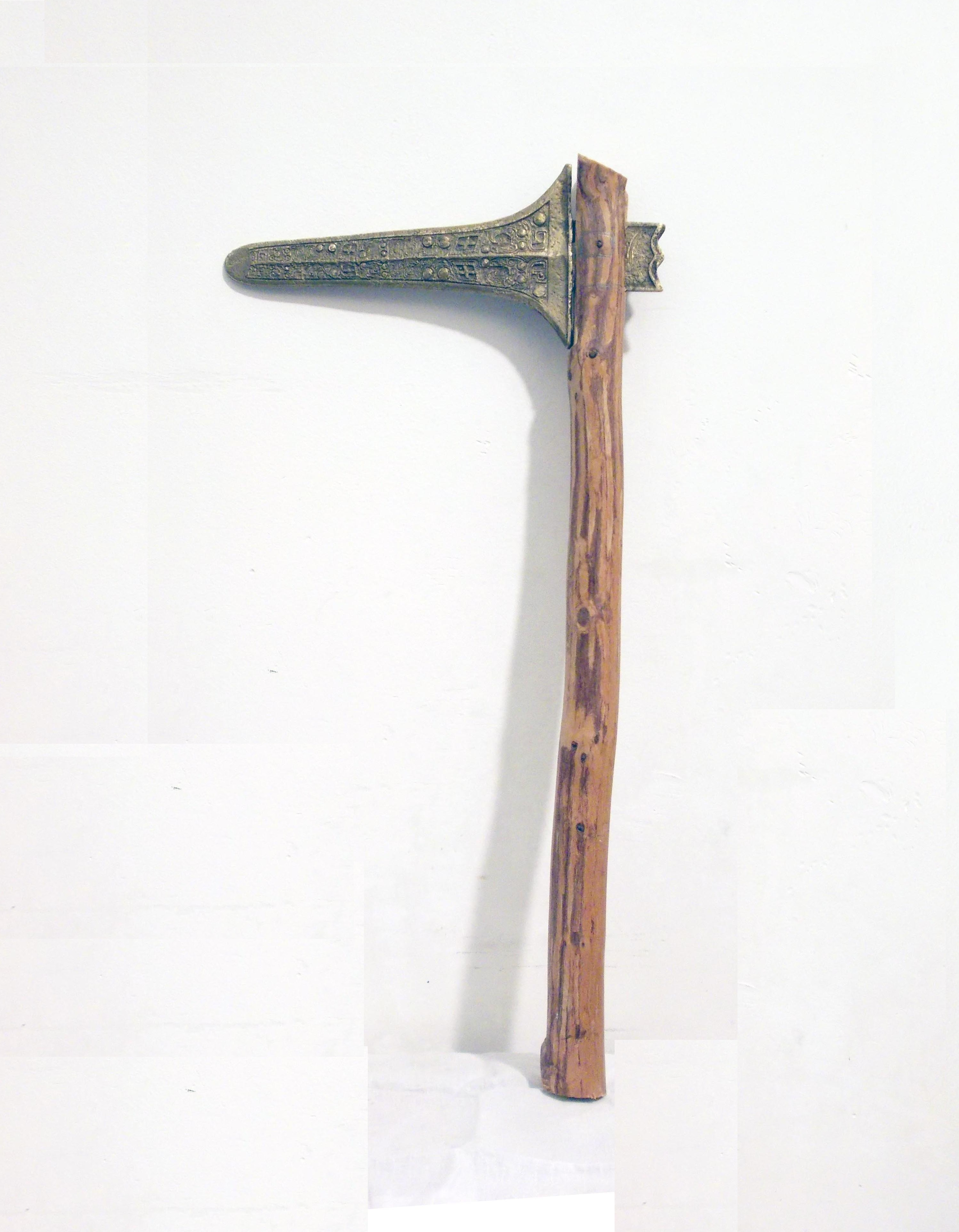 manico in bosso, lunghezza 50 cm.